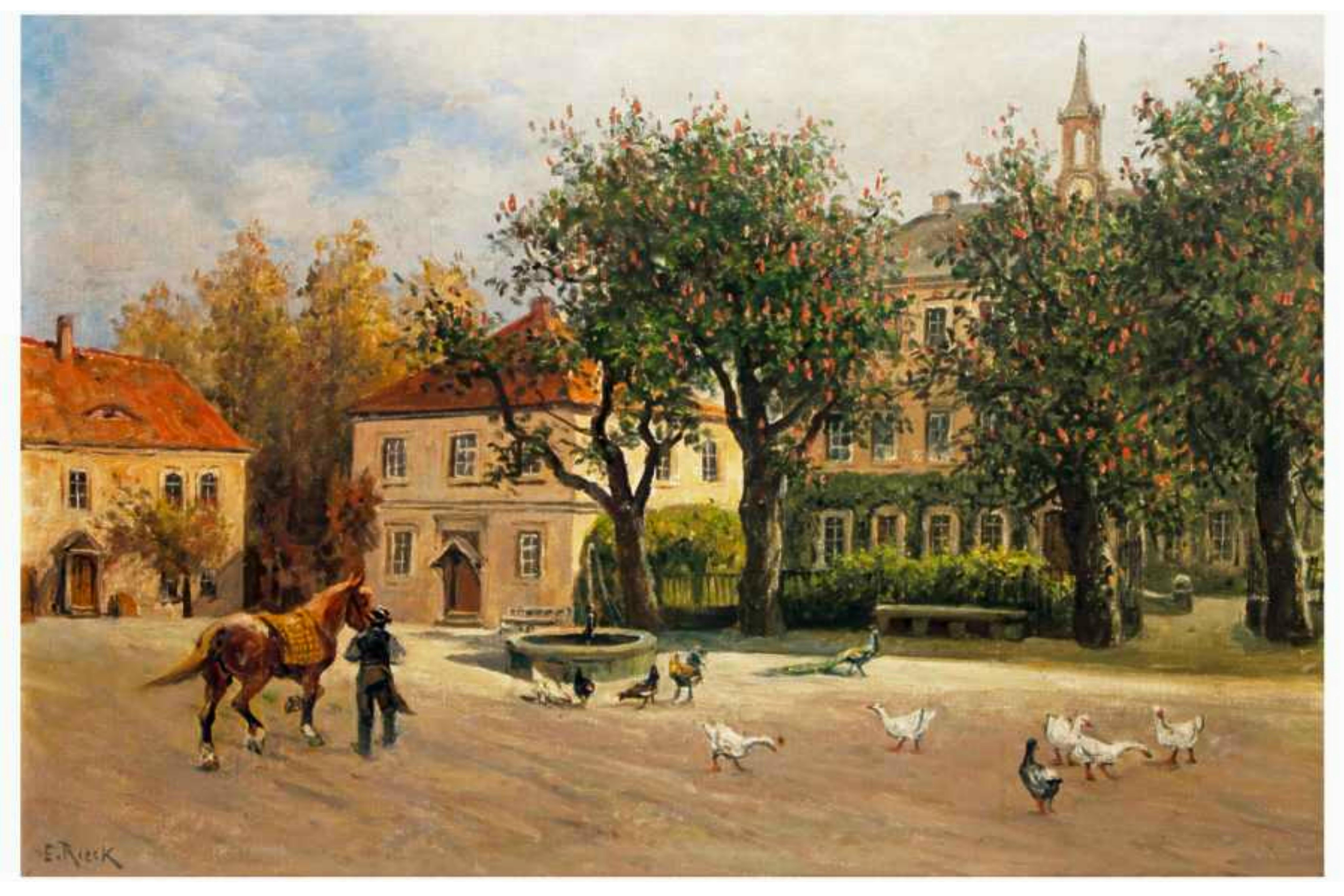 Schloss Lauterbach, Gutshof um 1903. Ansichtskarte nach einem Bild von Emil Rieck aus Moritzburg.